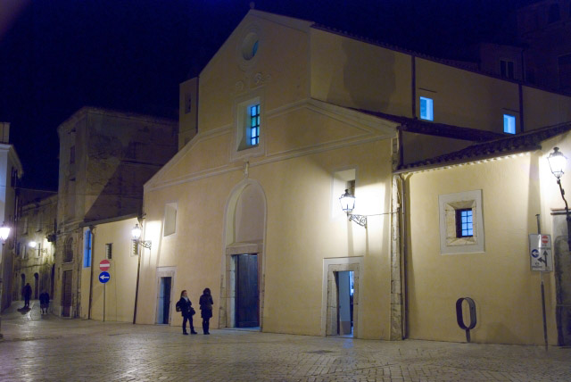 Facciata della Chiesa del SS. Nome di Dio nel Largo di Corte a San Lorenzo Maggiore (BN)